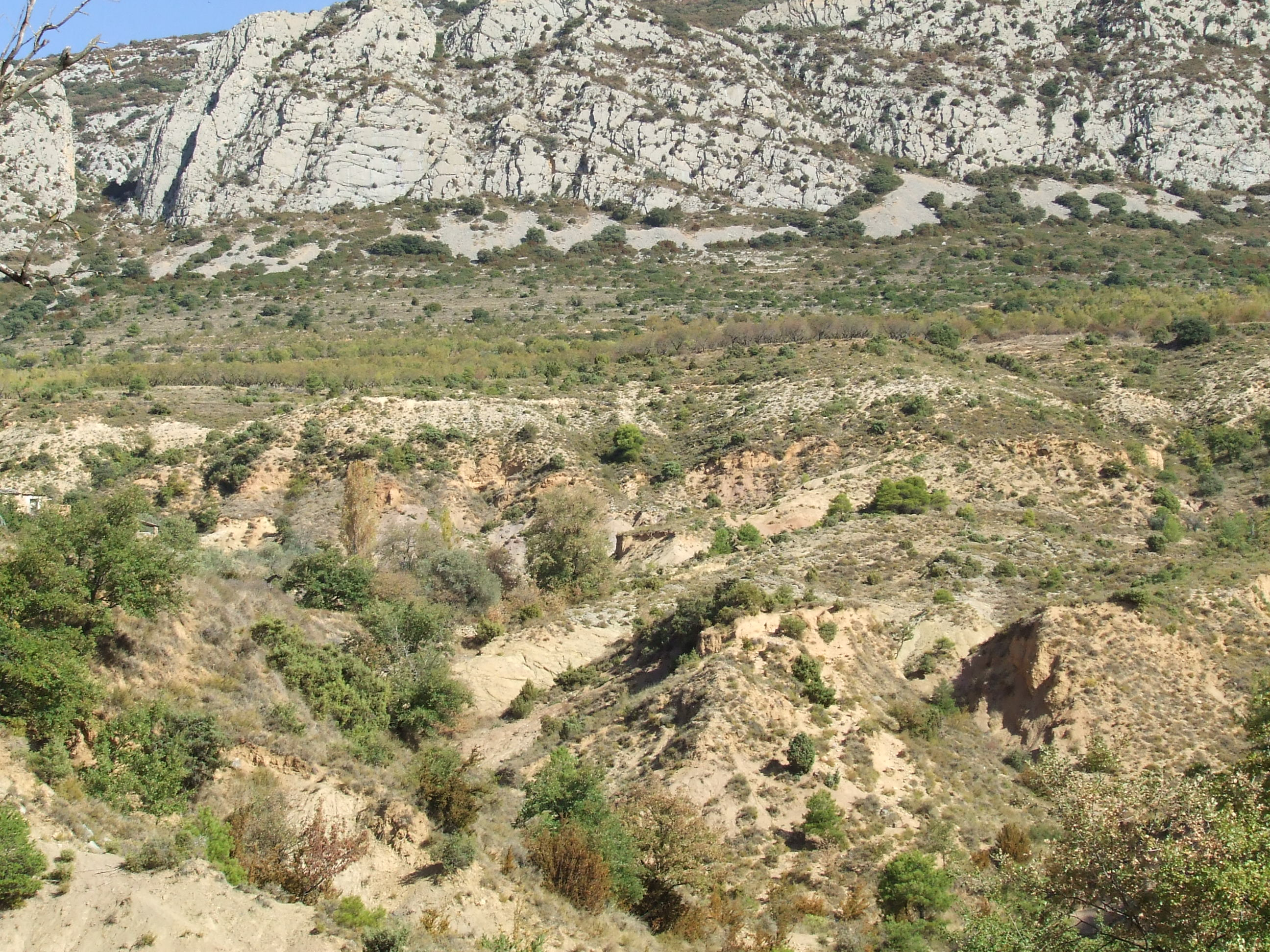 Lo Llinar (Abella de la Conca, Pallars Jussà)